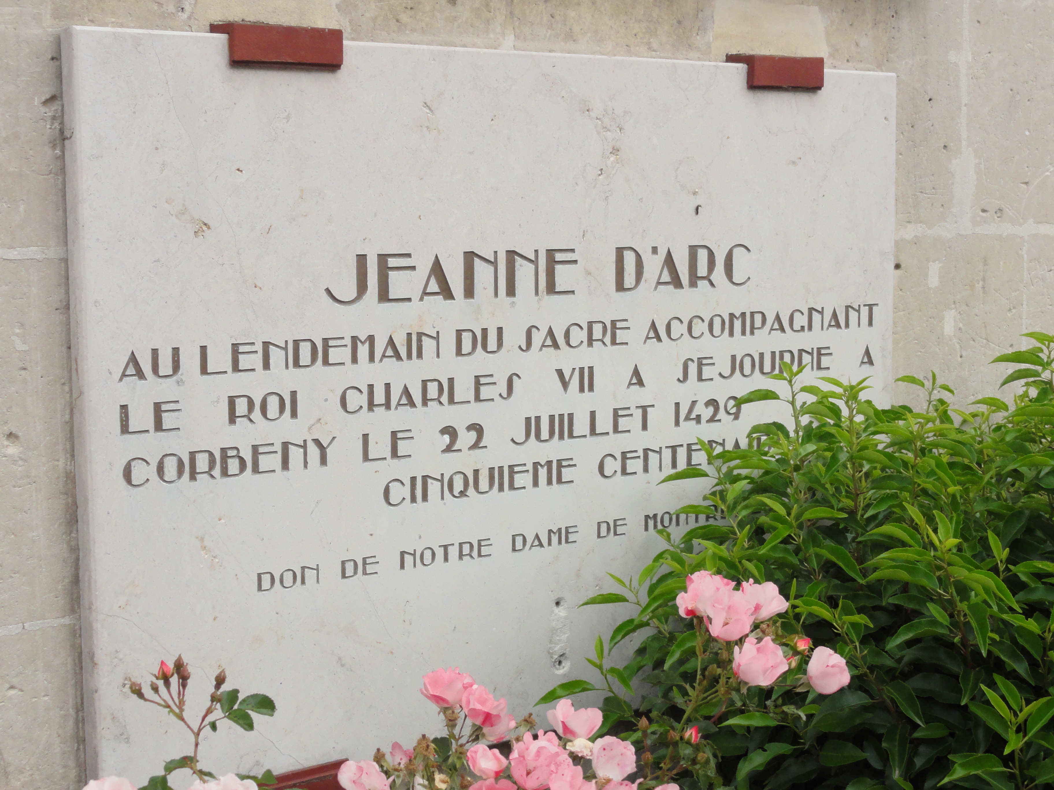 Corbeny (Aisne) mairie, plaque Jeanne d'Arc